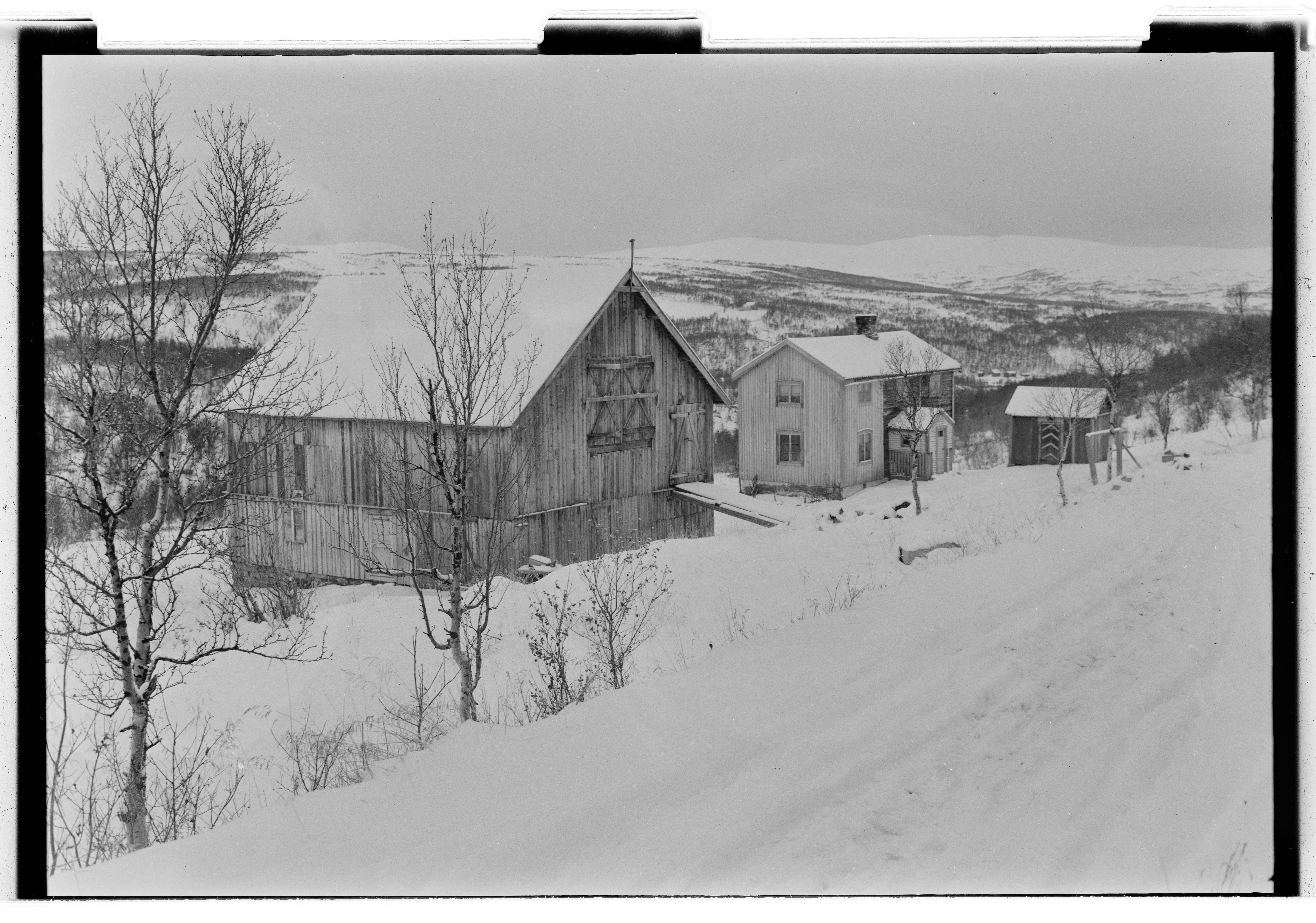 Bildet er hentet fra Arkivverket. Hessdalen, fjellgrend med forlatte gårder, vinter, mosehenting. NÅ nr. 2 Arkivinstitusjon : Riksarkivet Arkivnavn : Billedbladet NÅ Sted : Norge, Sør-Trøndelag, Holtålen, Emneord: Eksteriør, Gårder, Vinter, Fjell Avbildet